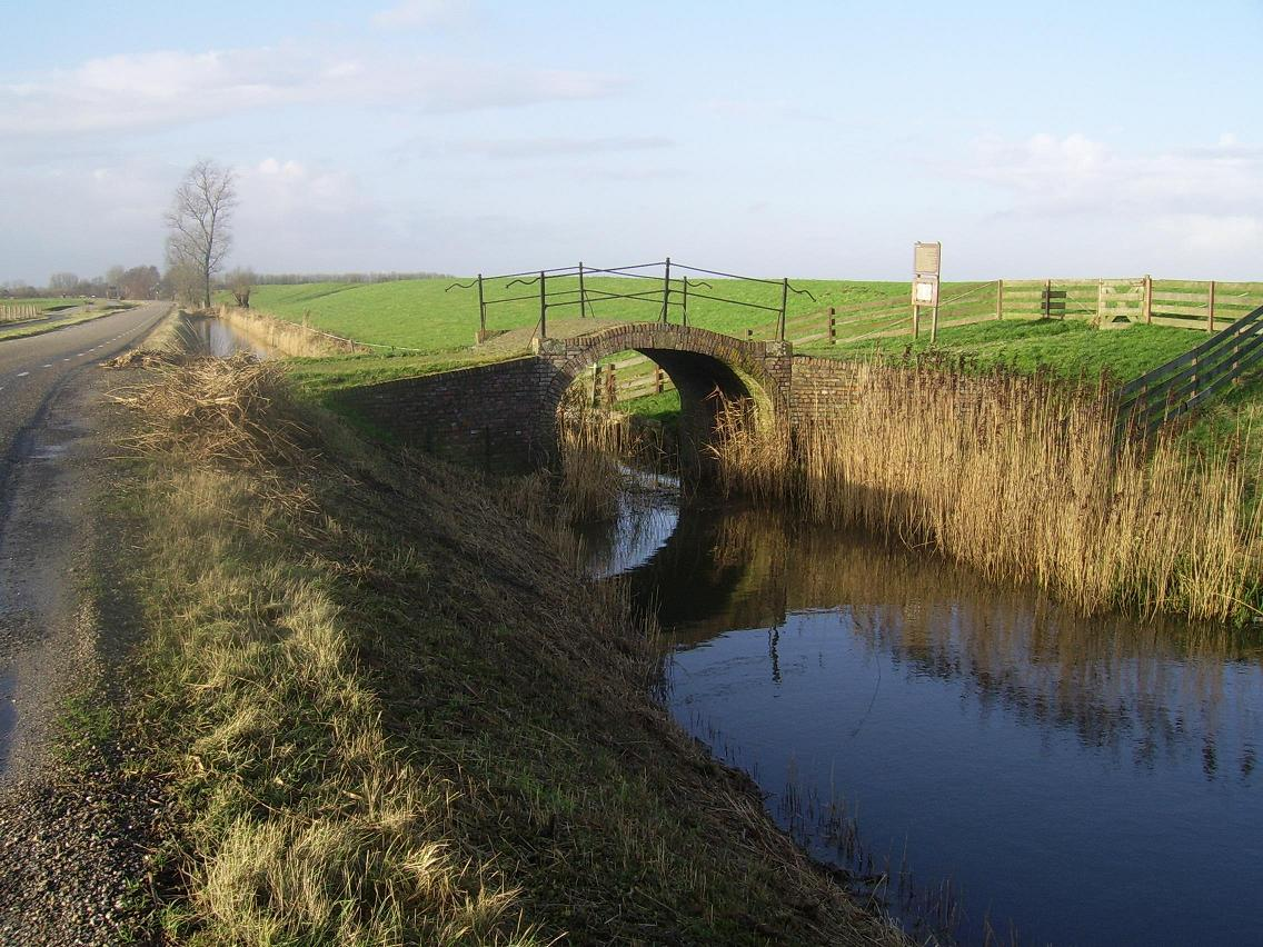 Het Piepke, een oud bruggetje (eerste vermelding uit 1802) aan de weg van 't Hoekje naar Munnekezijl, provincie Groningen, Nederland